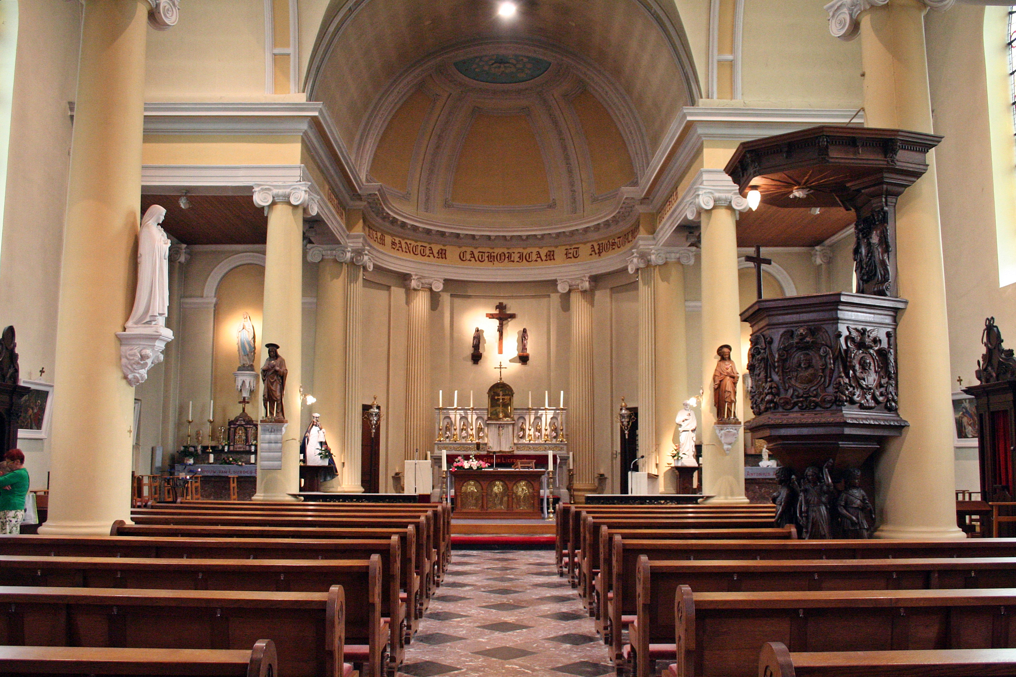 Wolfsdonk - Sint-Antonius Abt Kerk - Zicht op schip en hoogkoor